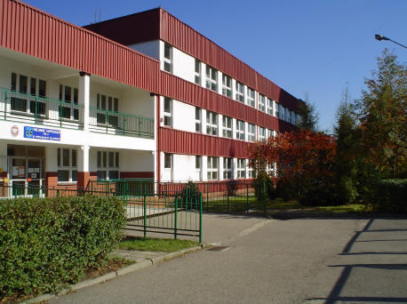 Miejskie Gimnazjum numer 4 w Piekarach Śląskich